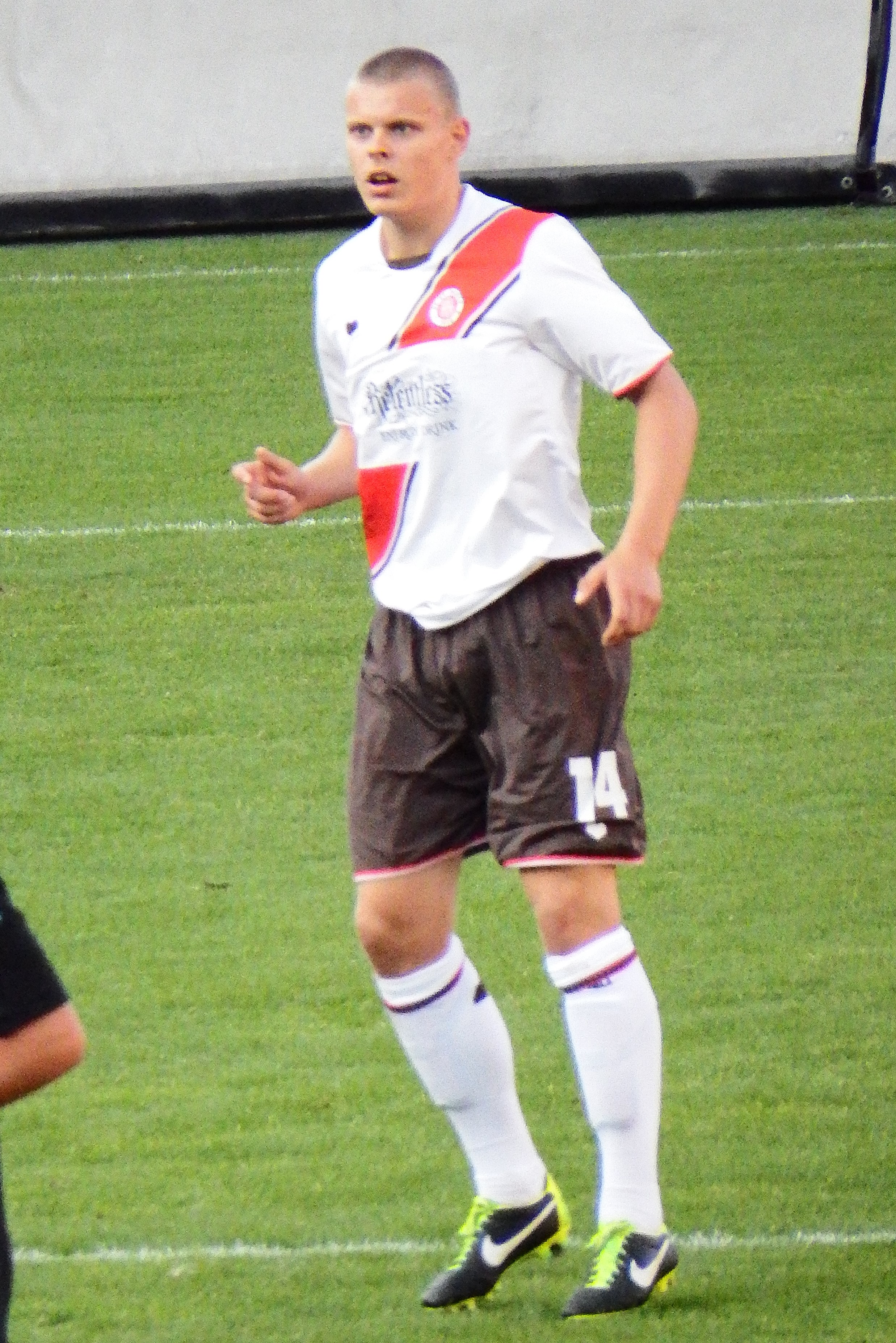 Kulikas, Laurynas StP II 13-14